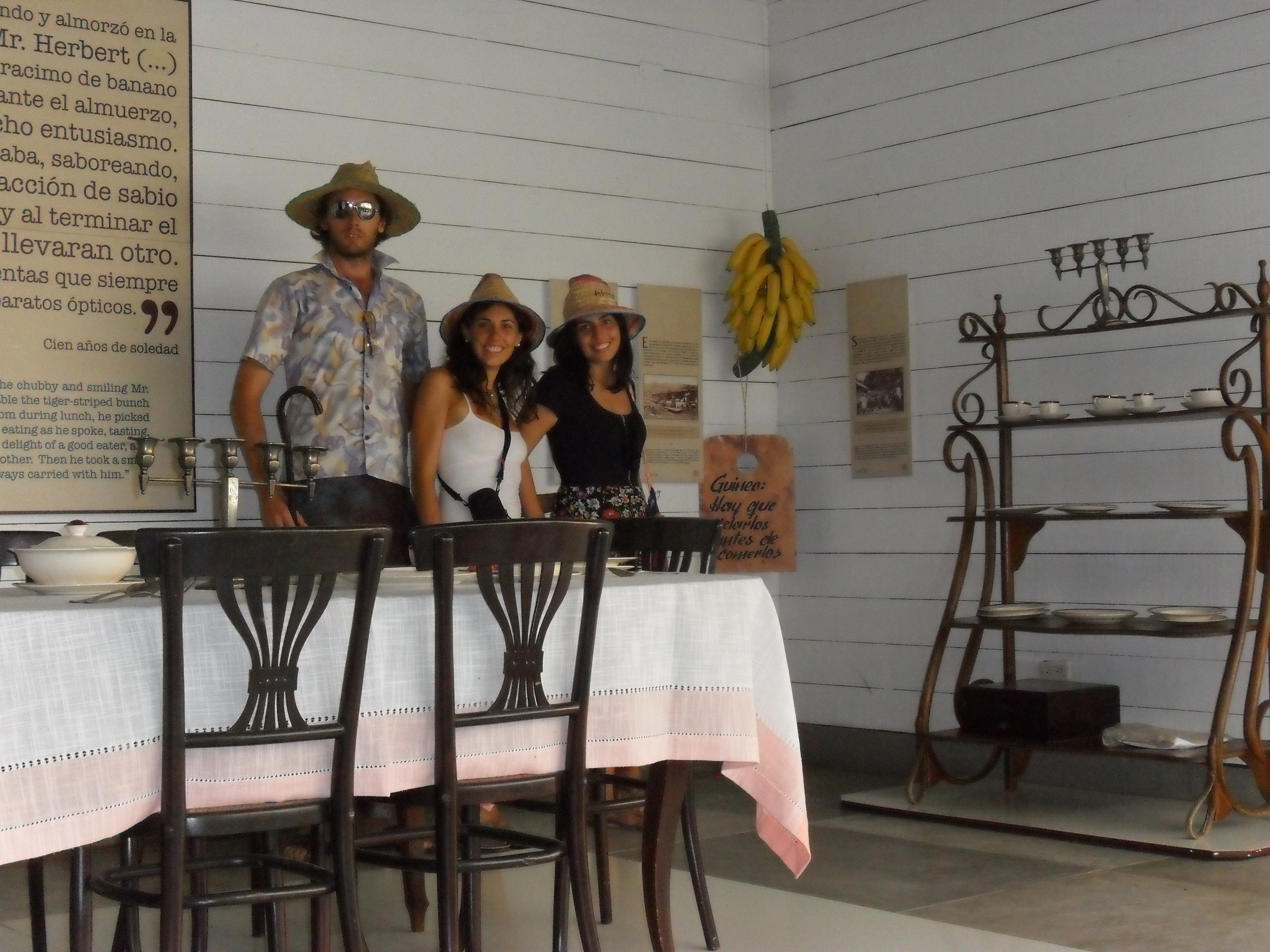 Inside the museum house Gabriel Garcia Marquez